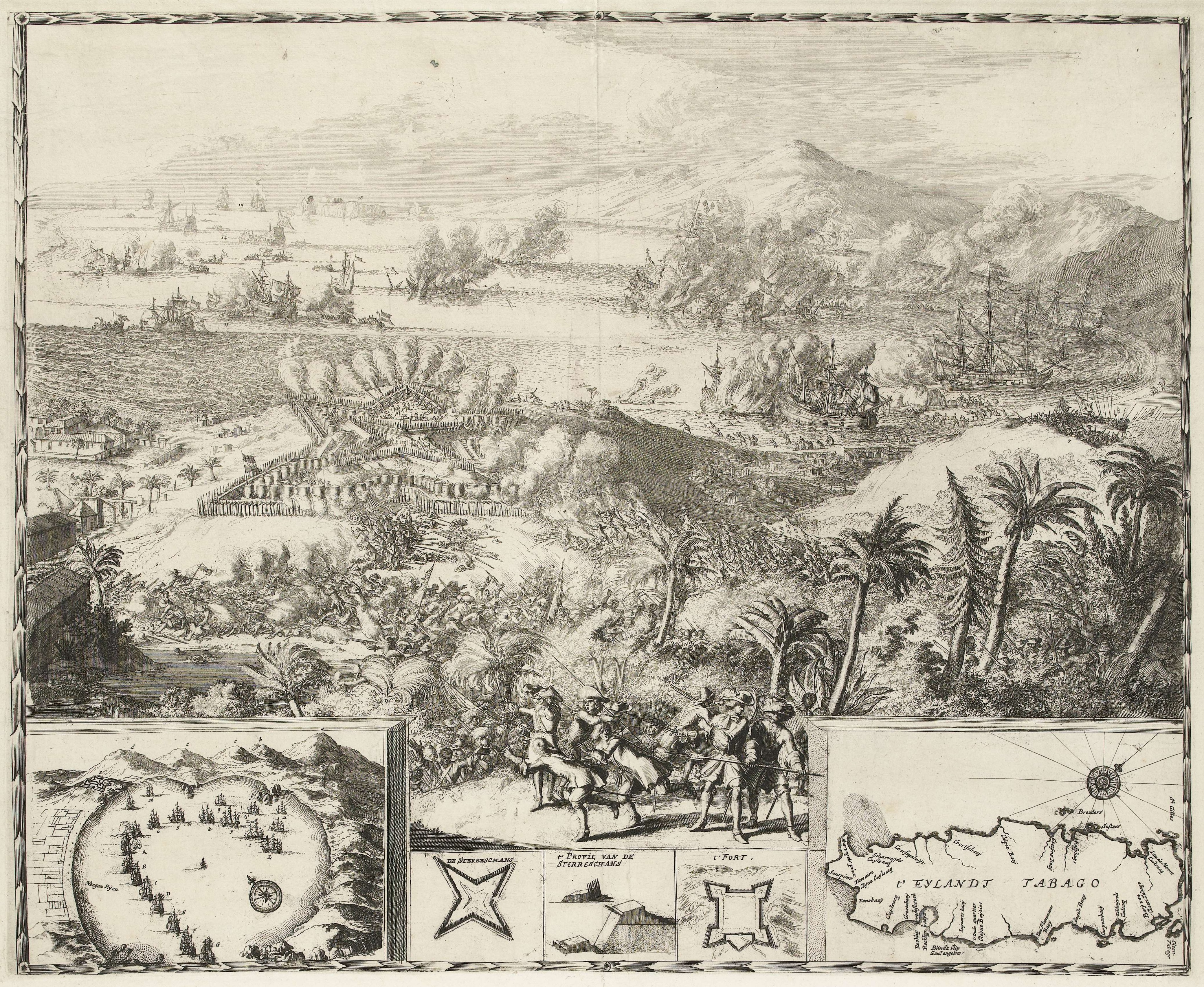 Сражение между голландцами и французами на острове Тобаго 3 марта 1677 года.